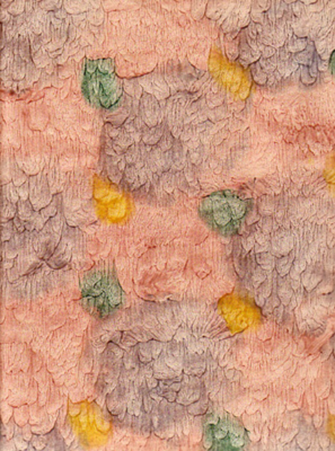 Abzugpapier, Mitte 18.Jh.